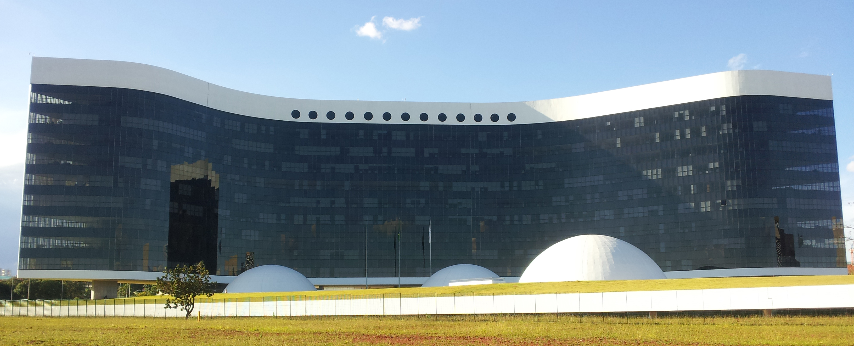 Nova sede do Tribunal Superior Eleitoral, Brasília.